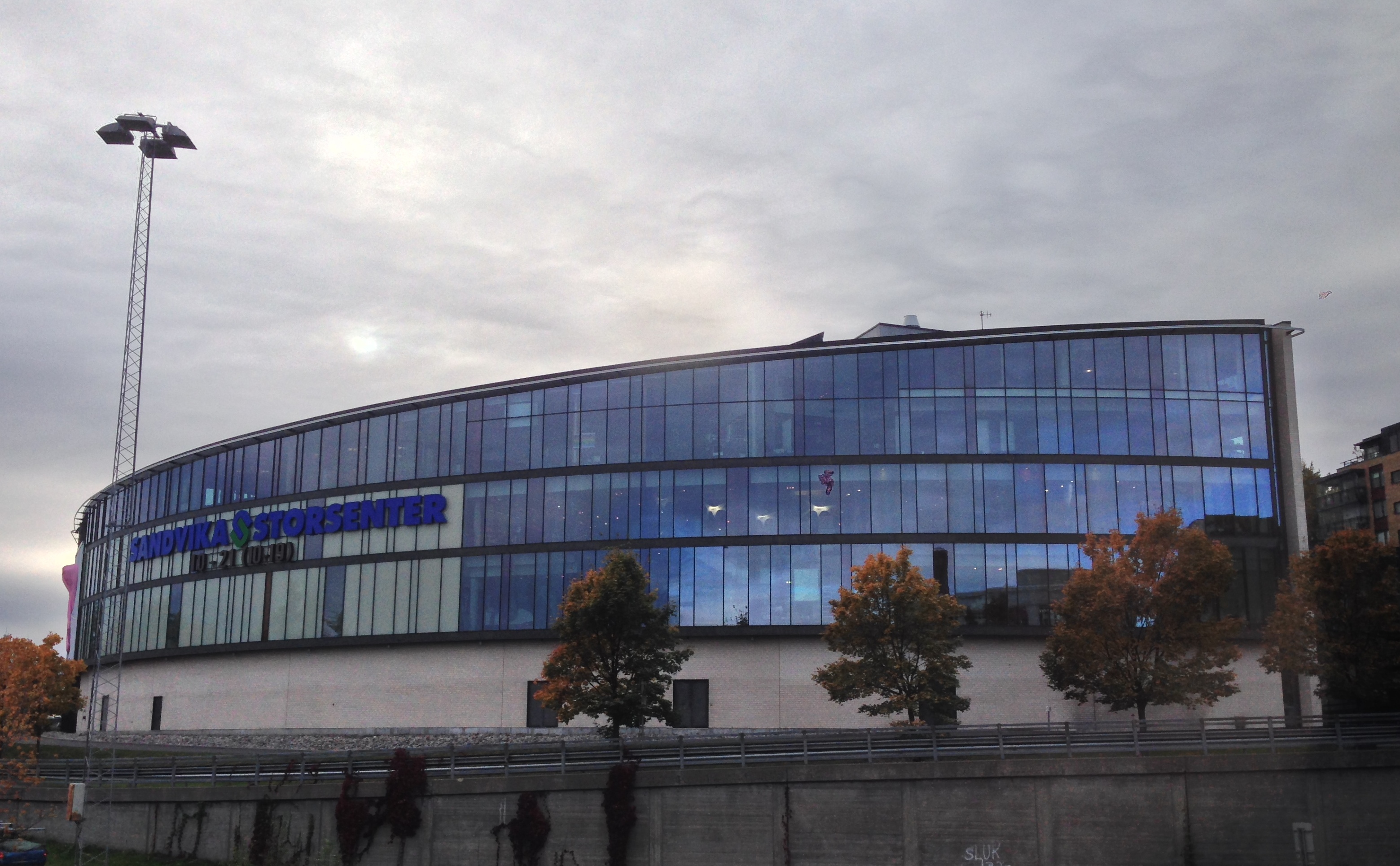 Sandvika Storsenter, et shoppingsenter i Sandvika i Bærum.